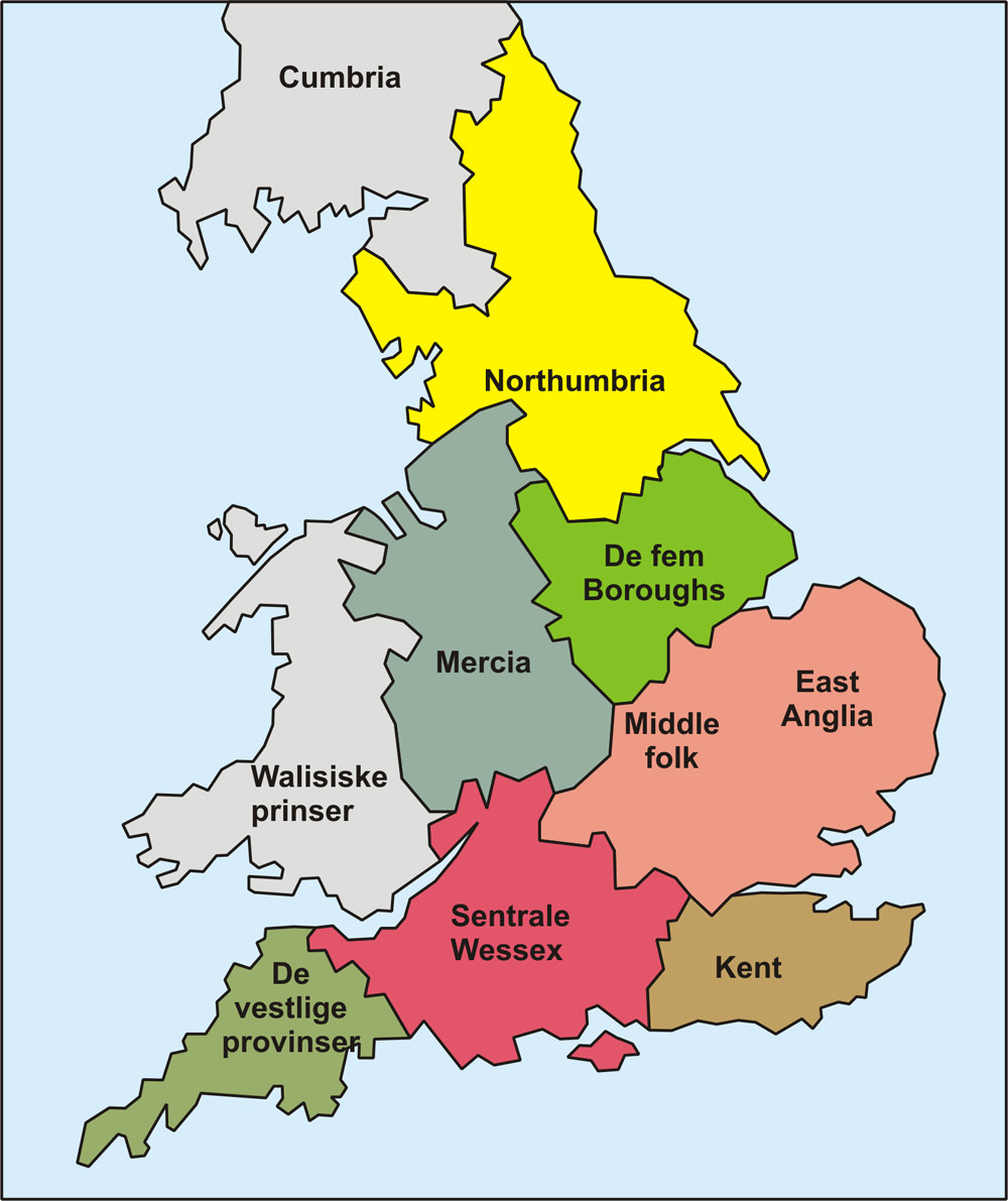 Kart over engelske jarldømmer rundt år 1025 (Map of the earldoms of England around 1025)